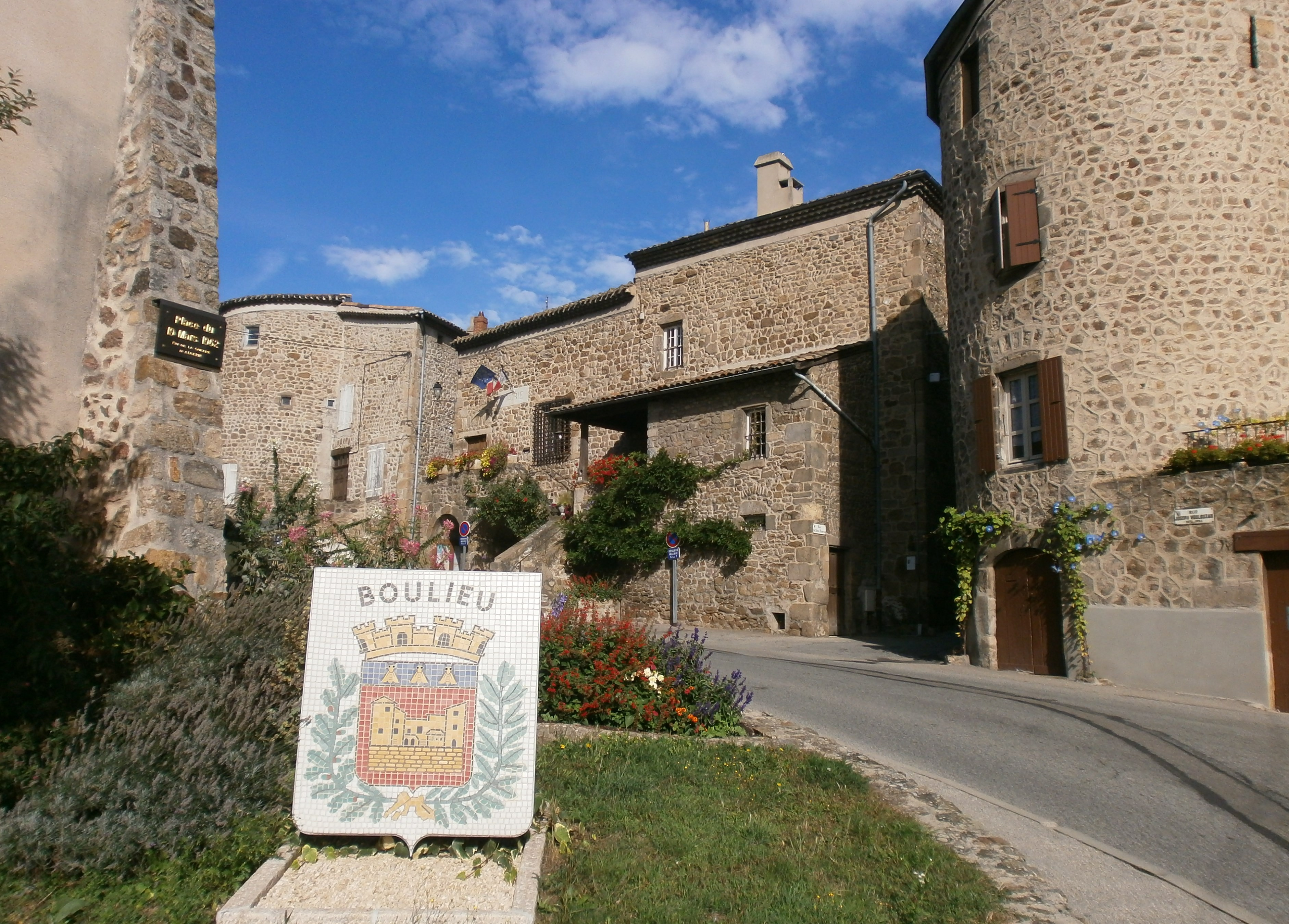 Boulieu-lès-Annonay, entrée du village.